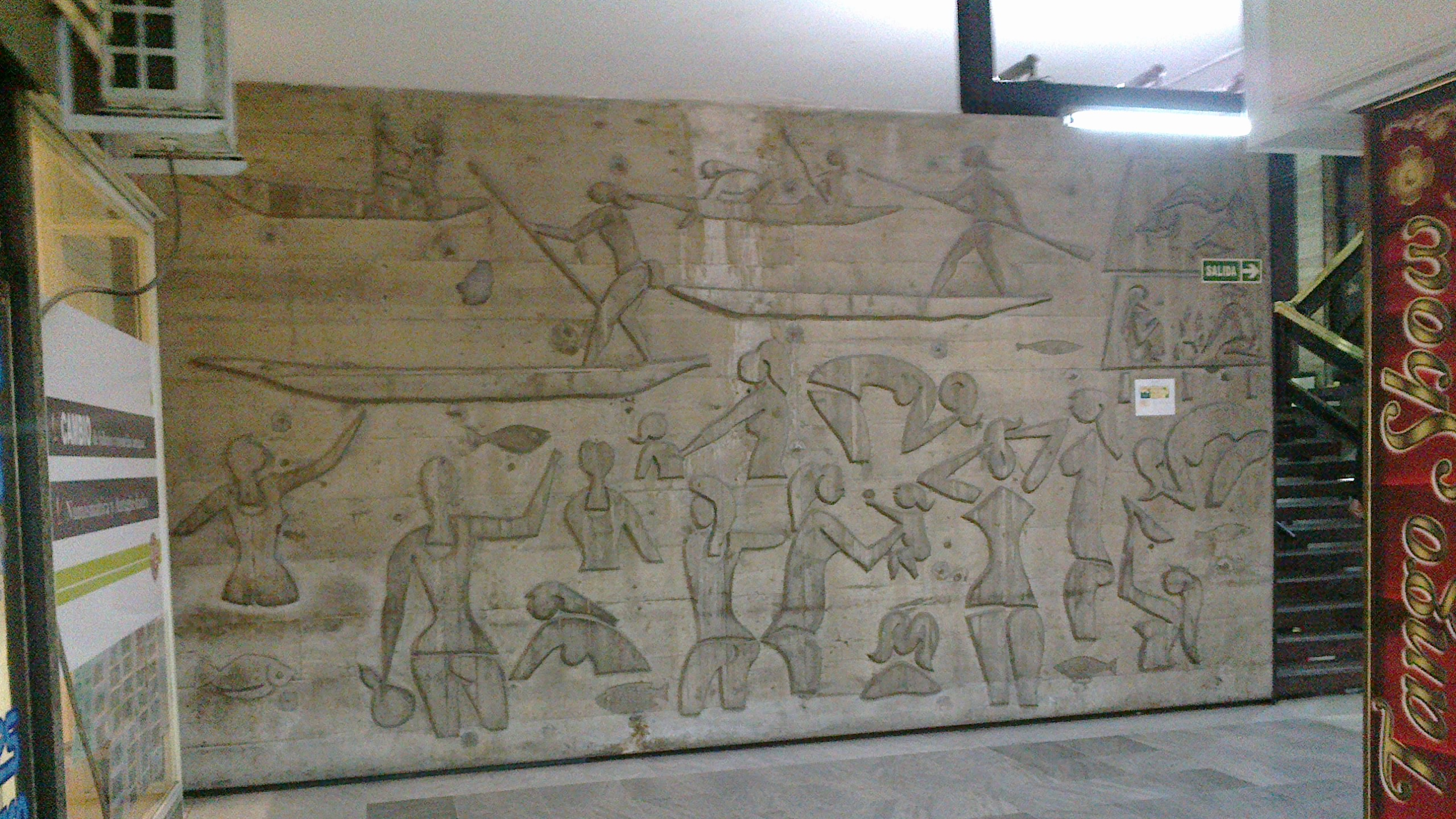 Galería Boston, en el número 142 de la peatonal Florida, Buenos Aires, Argentina. Obra de Héctor Julio Páride Bernabó (Carybé).